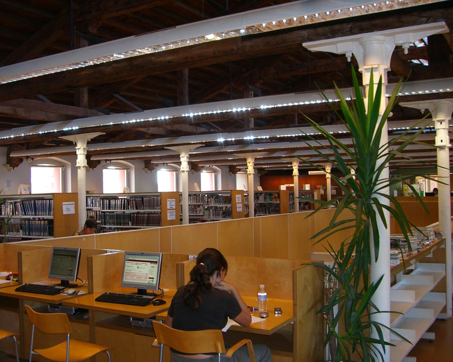 Sants-Montjuïc (Barcelona)